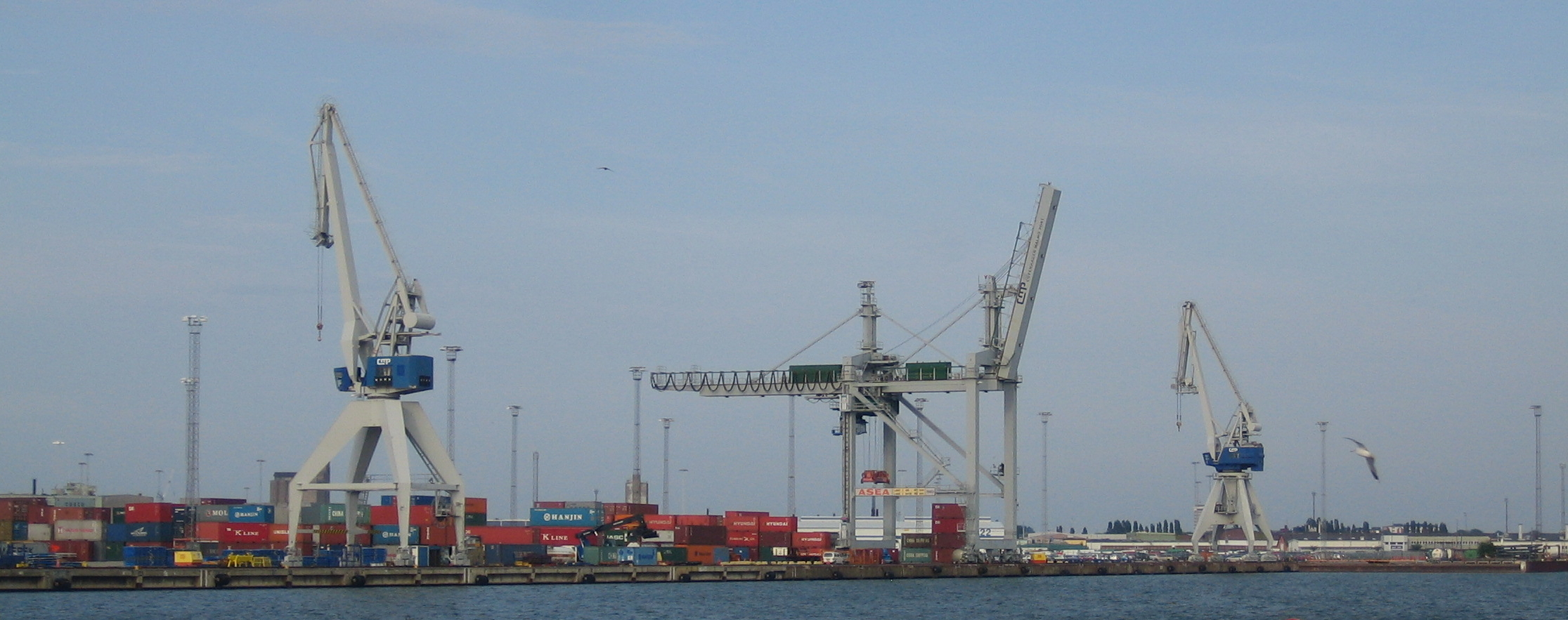 Frihamnen. International transit harbour in Malmö, Sweden.